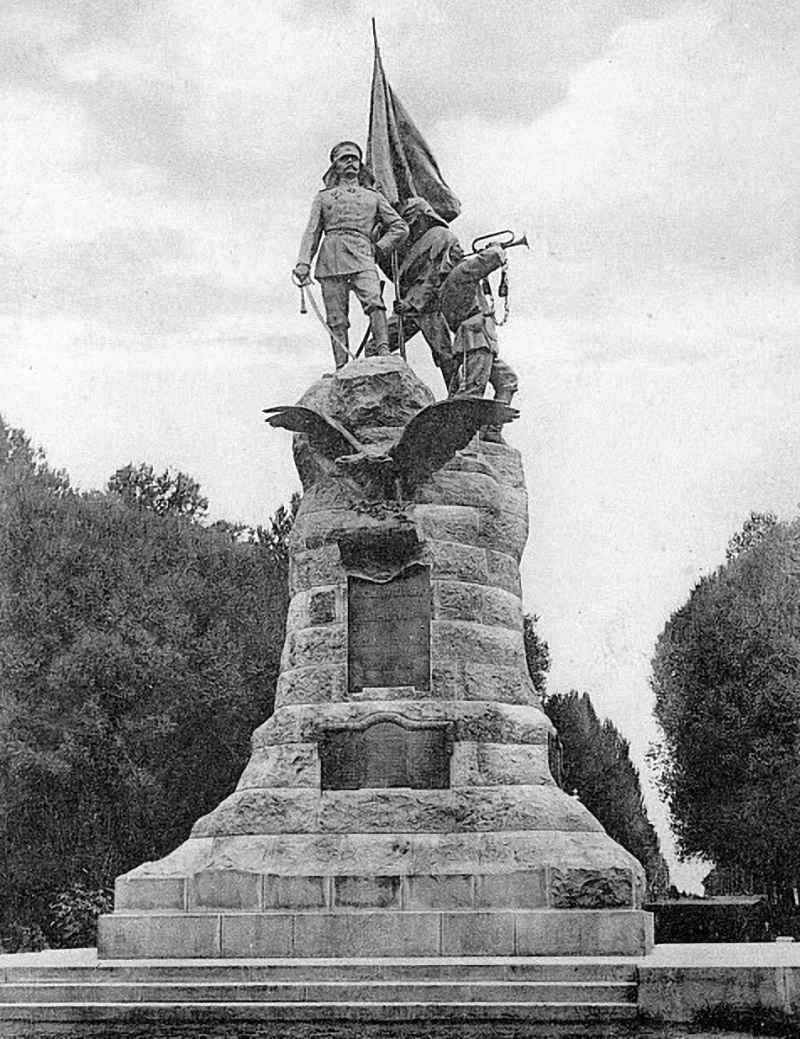 Памятник генерал-губернатору Туркестана К. П. Кауфману